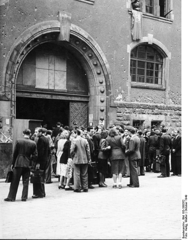 Berlin, Humboldt-Universität, Vorstudienanstalt ADN-ZB- Illus- Heilig Beginn des neuen Semesters am 1.10.1949 an der in die Arbeiter- und Bauern-Fakultät der Humboldt-Universität Berlin umgewandelte Vorstudienanstalt in der Geschwister-Scholl-Straße. 4066-49